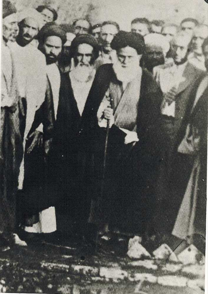 ميرزا مهدى شيرازى به همراه حاج آقا حسين قمى